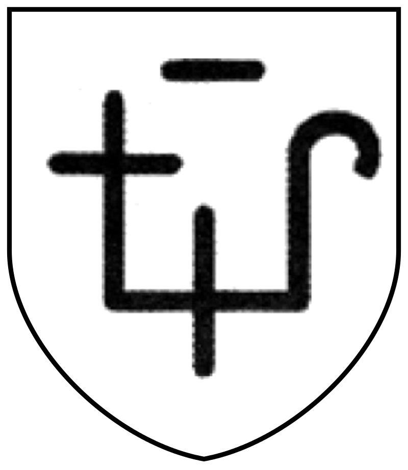 Знач Чернігівських Ольговичів